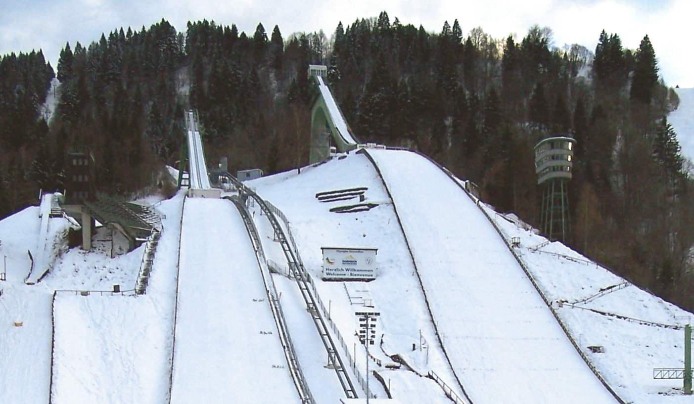 Die alte Olympia-Schanzen (bis 2007) in Garmisch-Partenkirchen